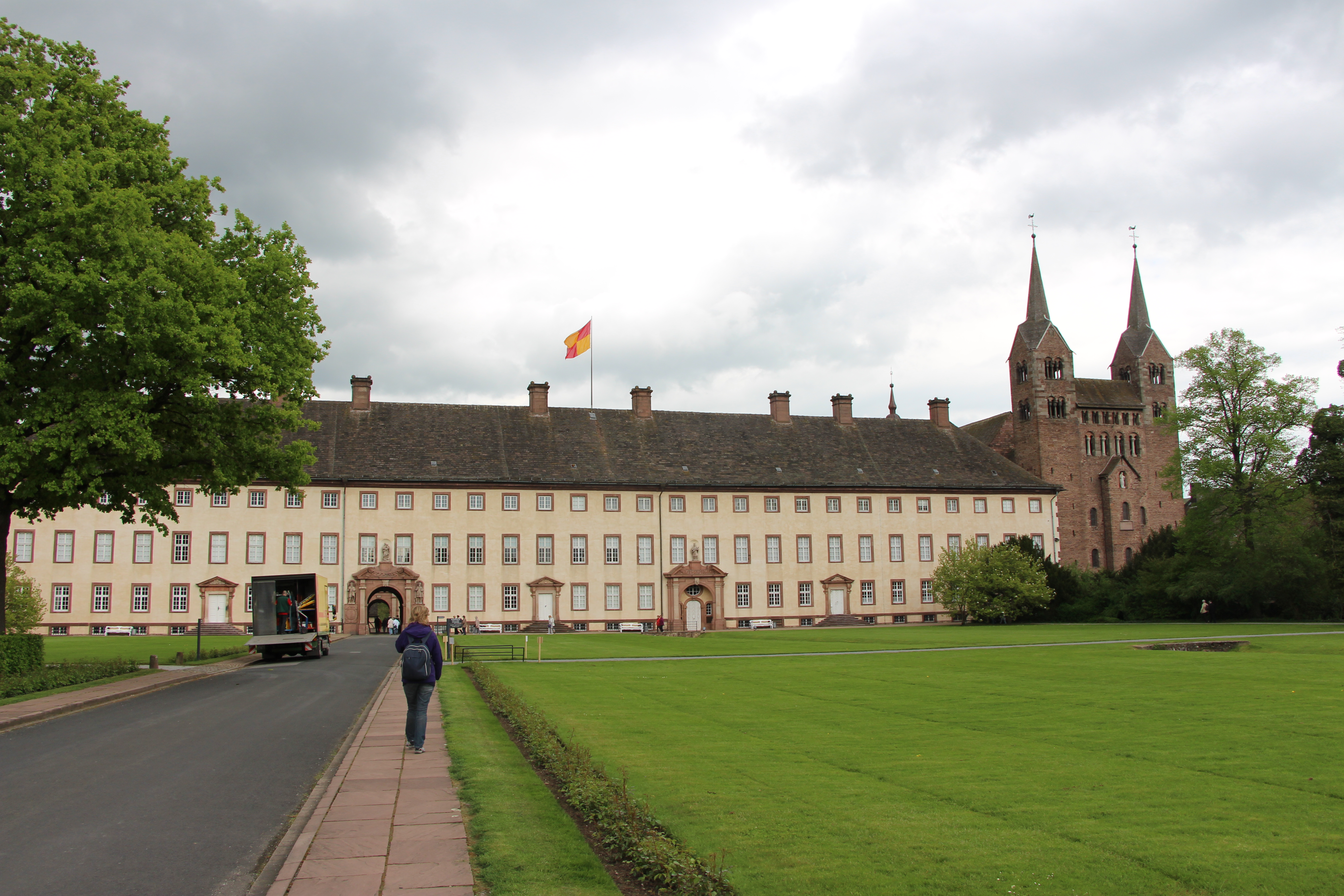 Corvey.